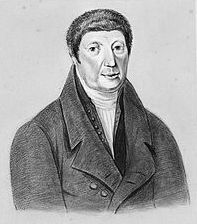 Tekening in zwart-wit van Nicolaas Anslijn.